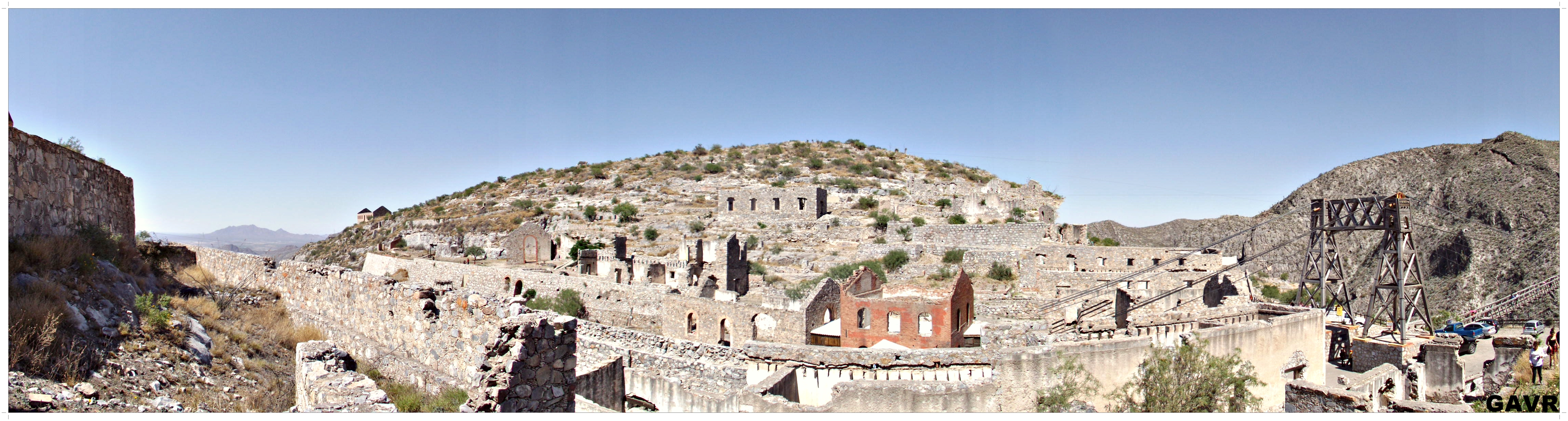 pueblo fantasma de ojuela